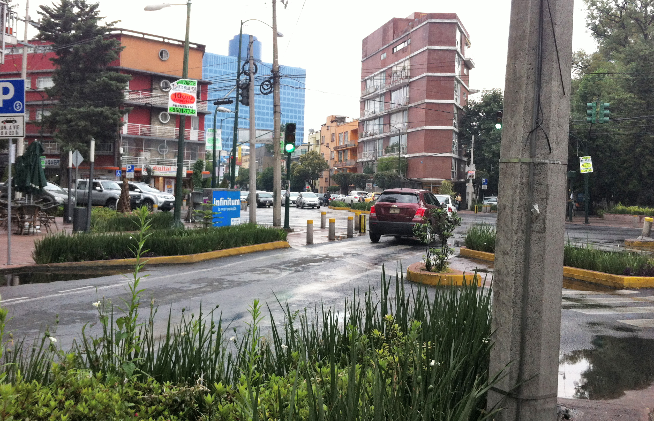 Cruce de las calles Pennsylvania, Dakota y Alabama. A la derecha esta el Parque Esparza Oteo y al fondo puede verse el World Trade Center Ciudad de México